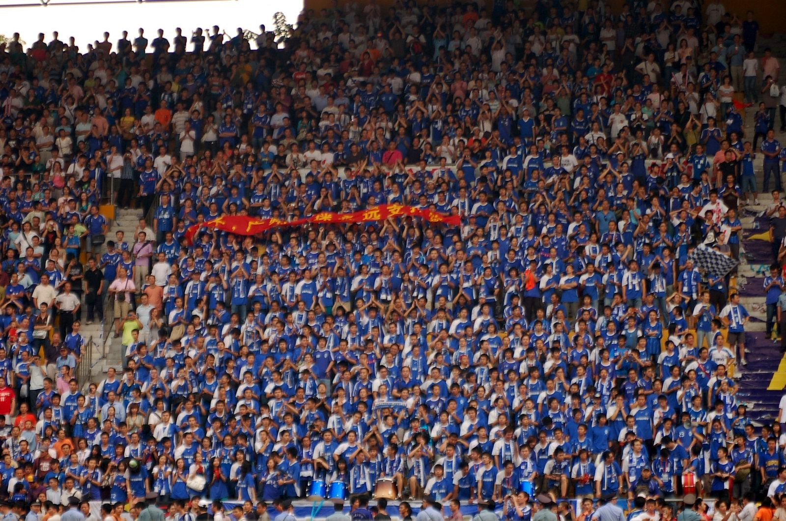 在越秀山体育场内，广州医药足球俱乐部的球迷